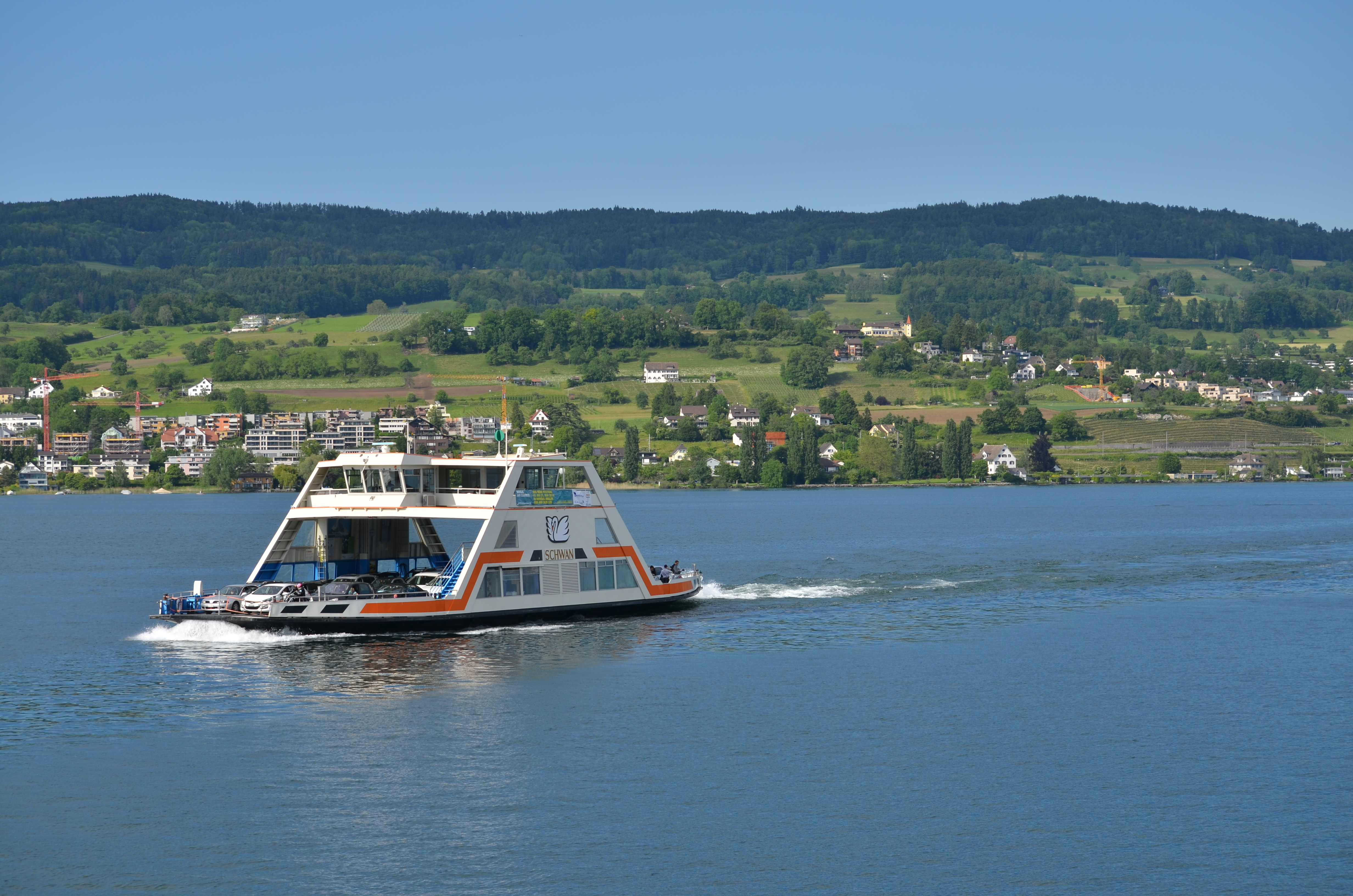 Views from FS Horgen on Zürichsee in Switzerland : Meilen and Pfannenstiel region